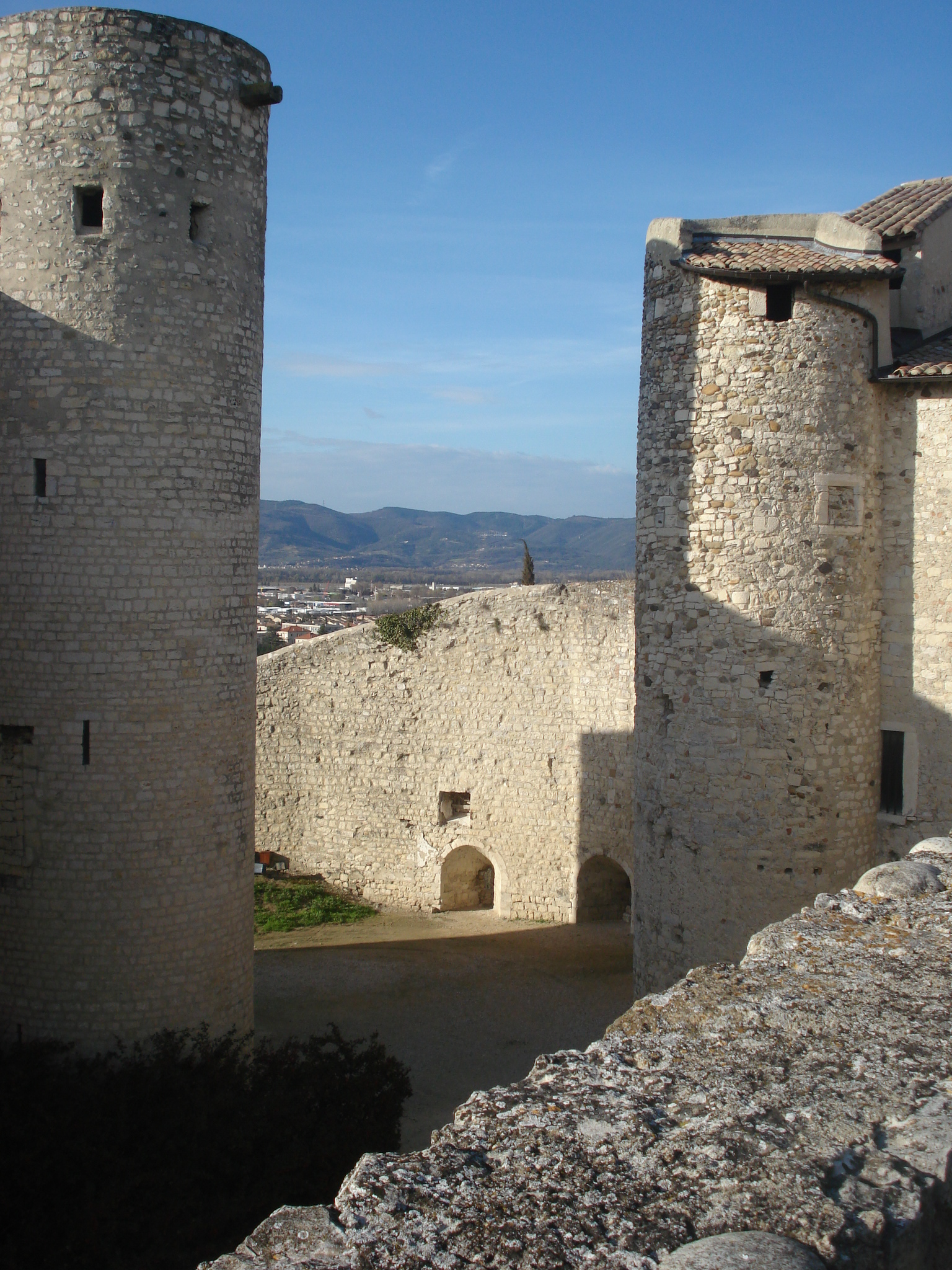 château des Adhémar à Montélimar (Drôme)